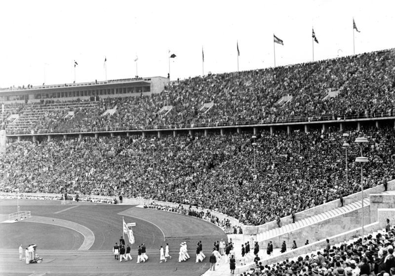 Berlin Olympiade 1936